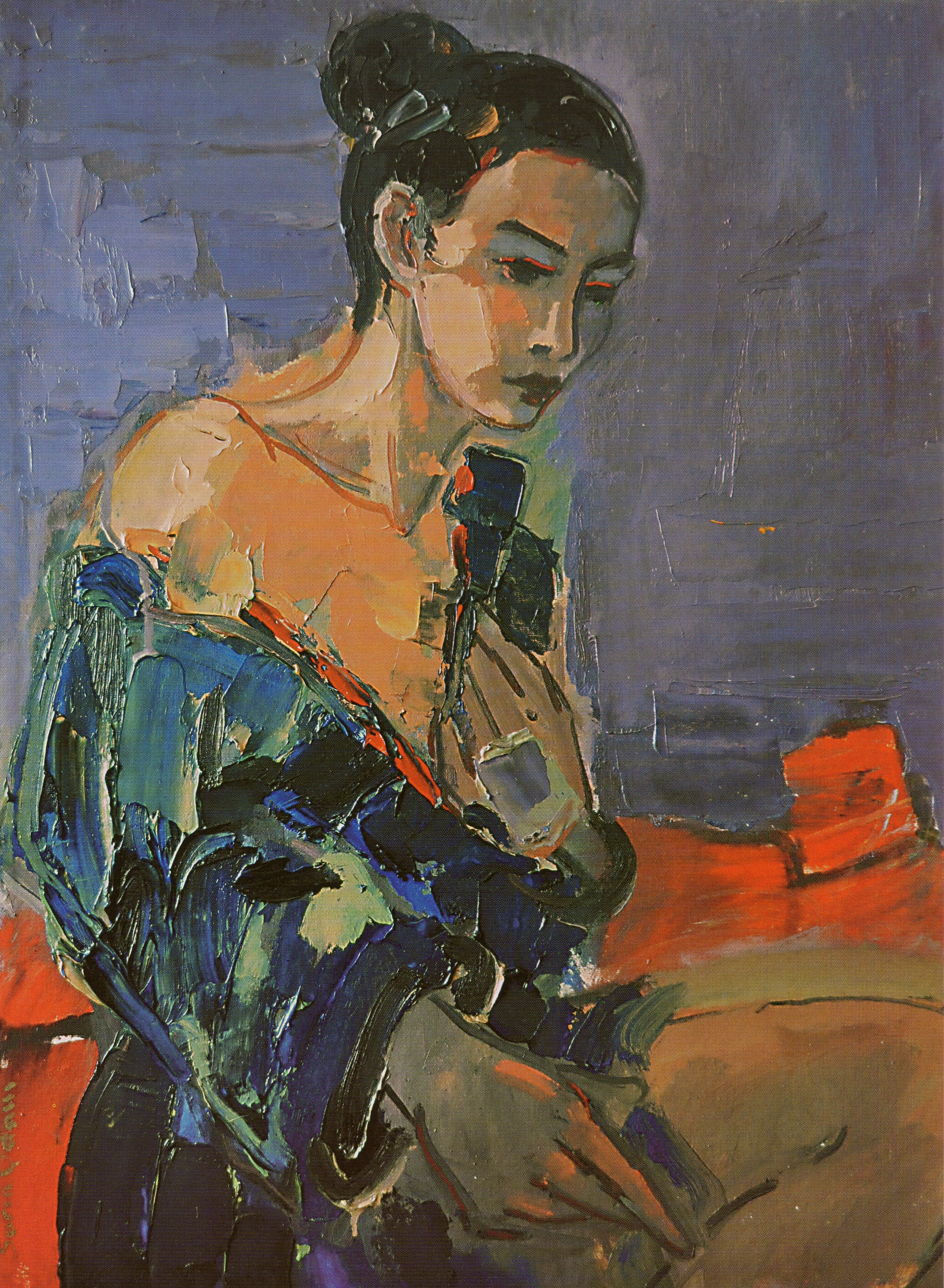 Sorin Adam - Melancolie, 55x70 u/p/c